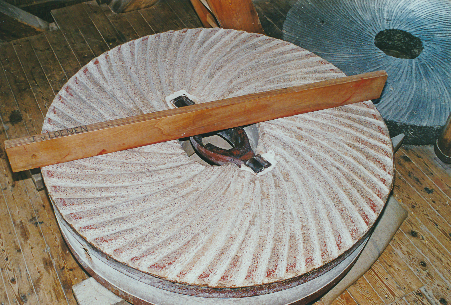 Kunststenen loper met rei